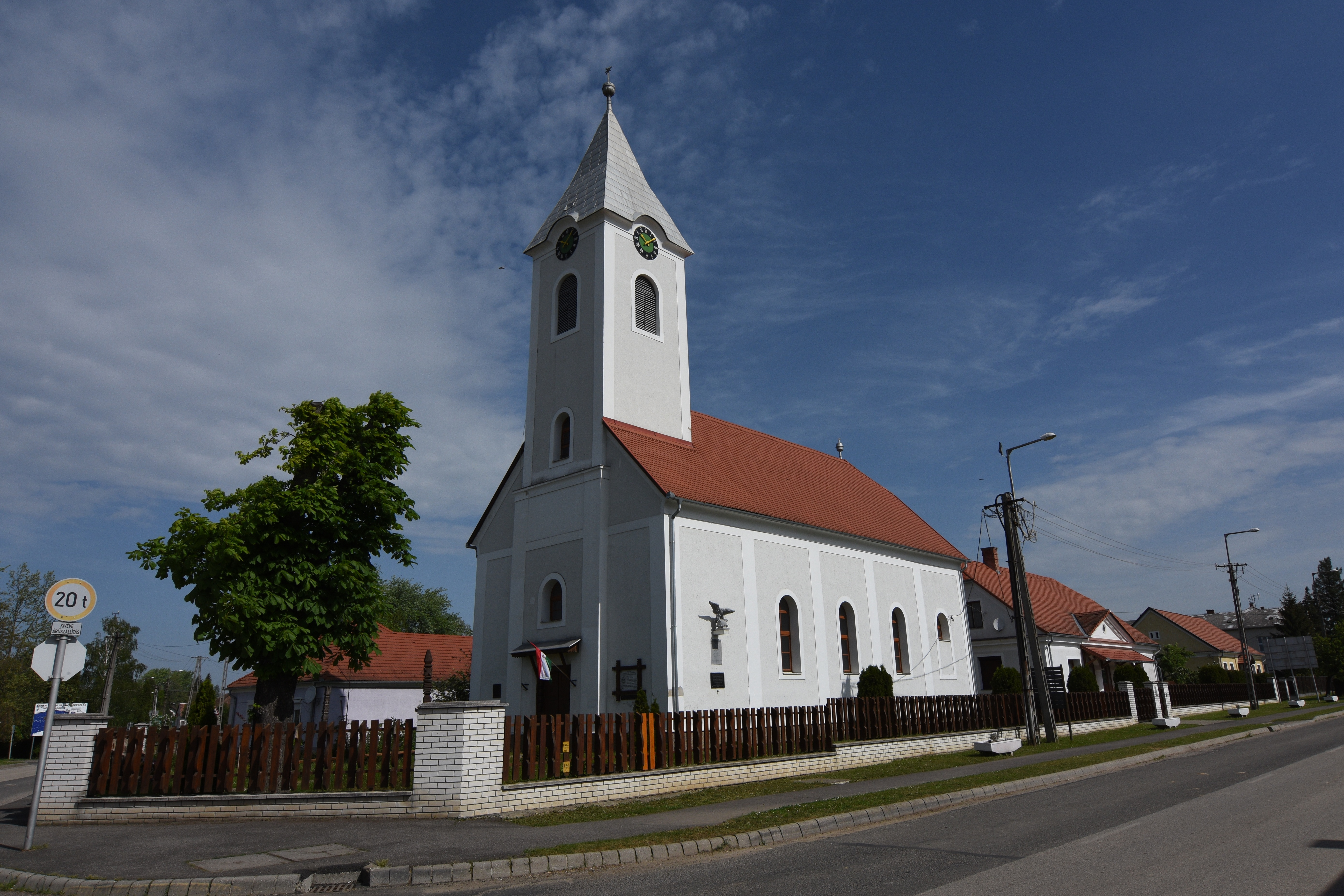 Reformed church in Senyeháza, Bajánsenye